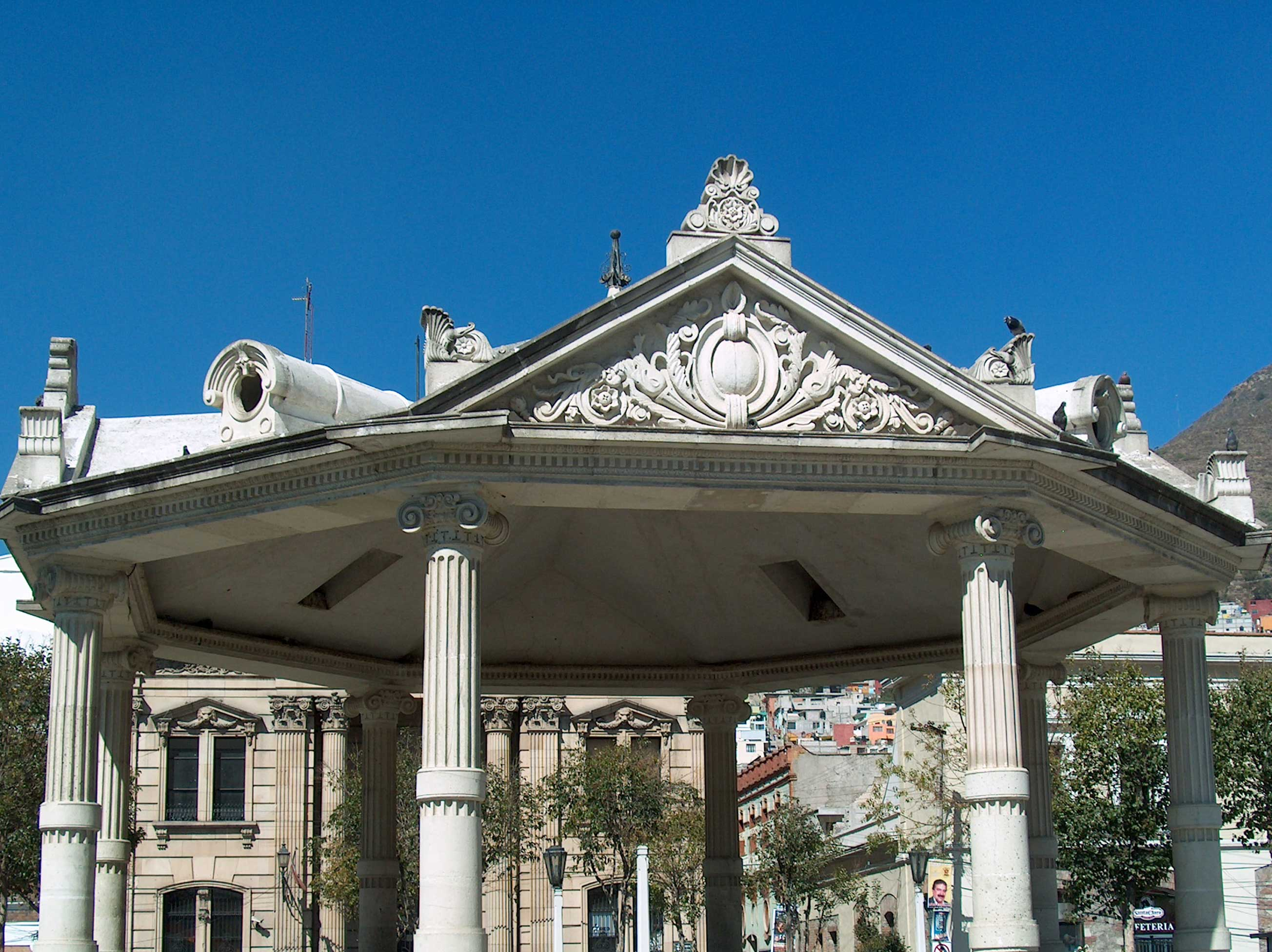 kisko de pachuca